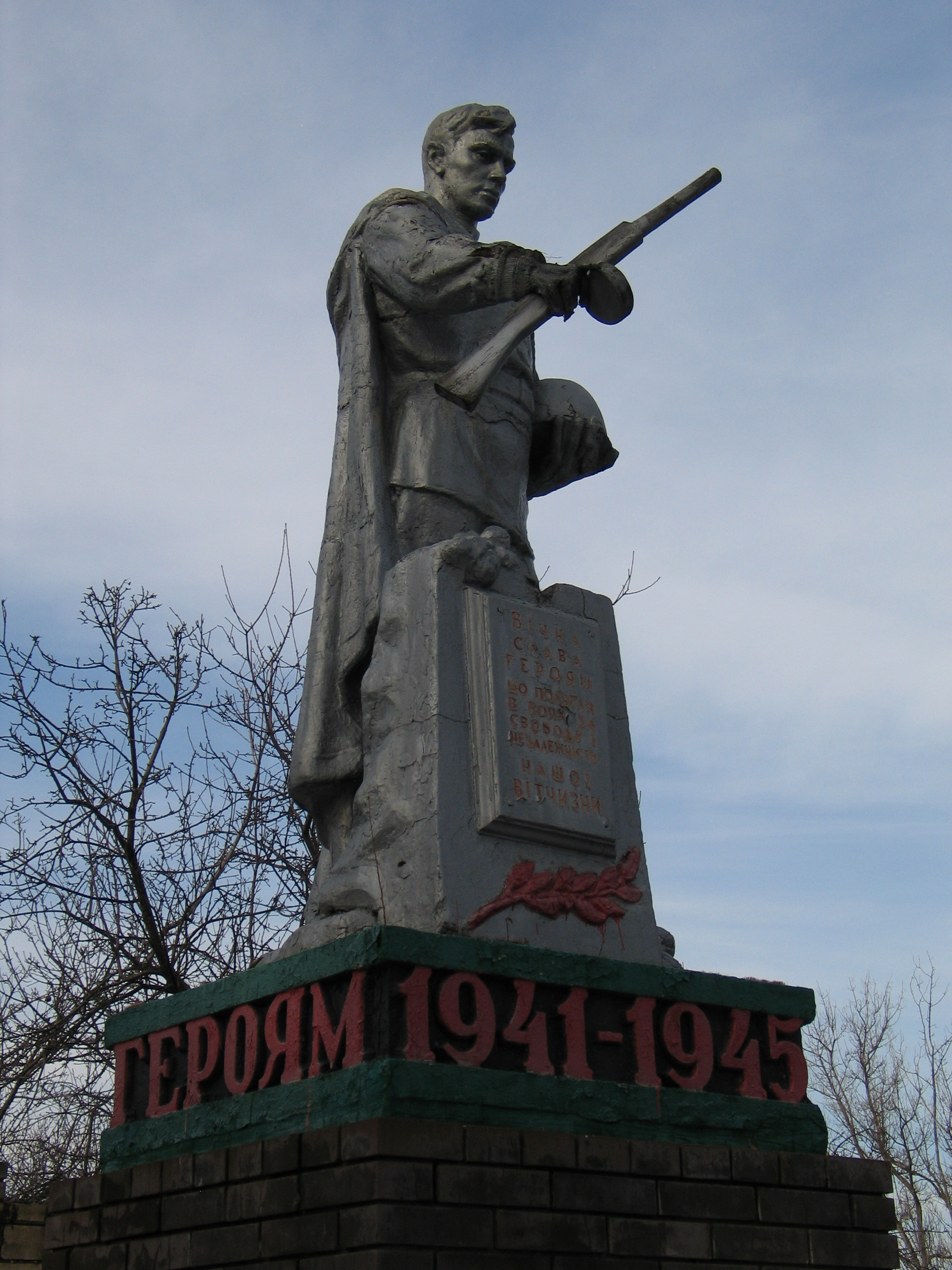 Братська могила радянських воїнів. Поховано 1708 воїнів., Суха Кам'янка